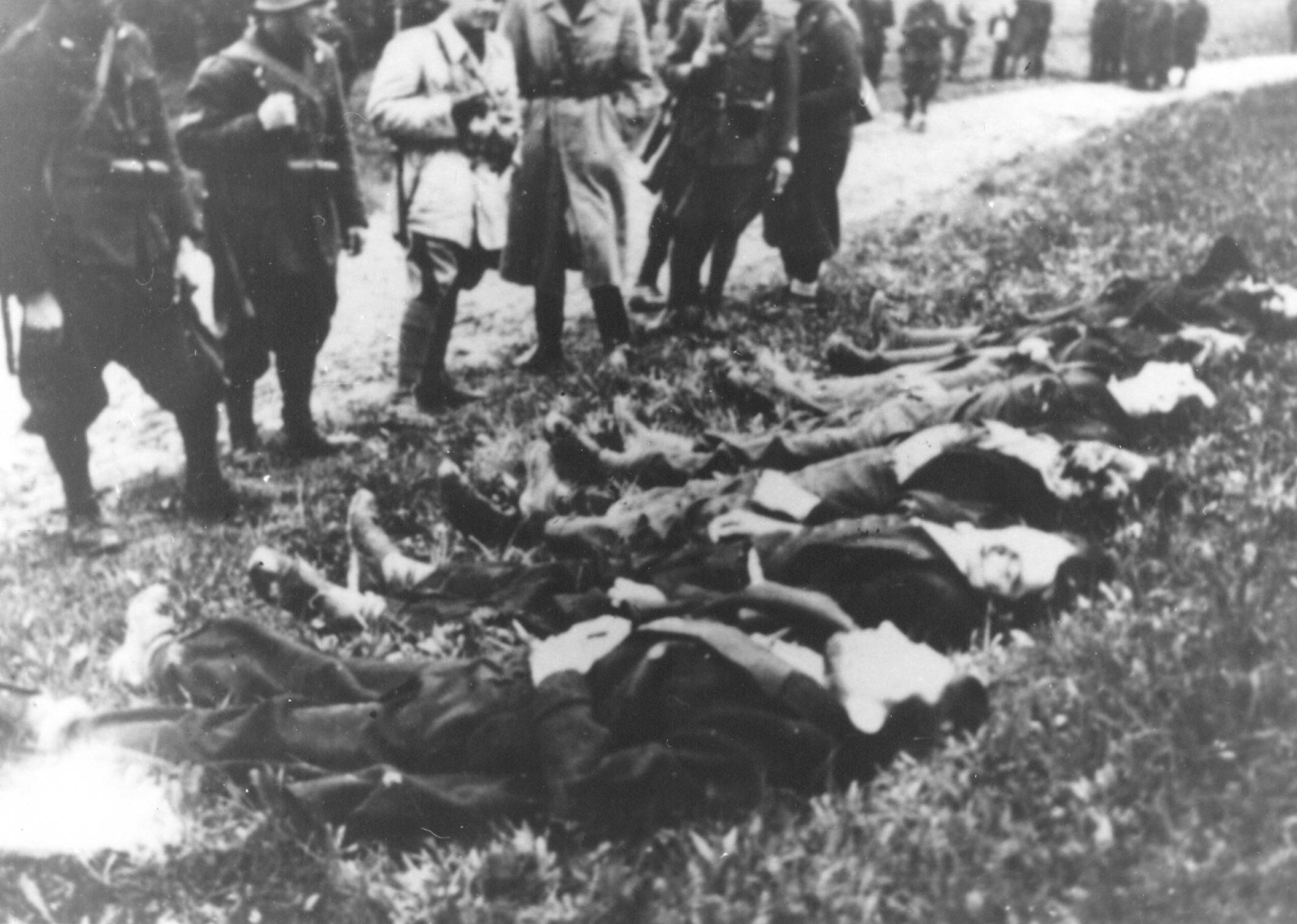 Pobiti slovenski talci, ki so jih ustrelili Italijani.